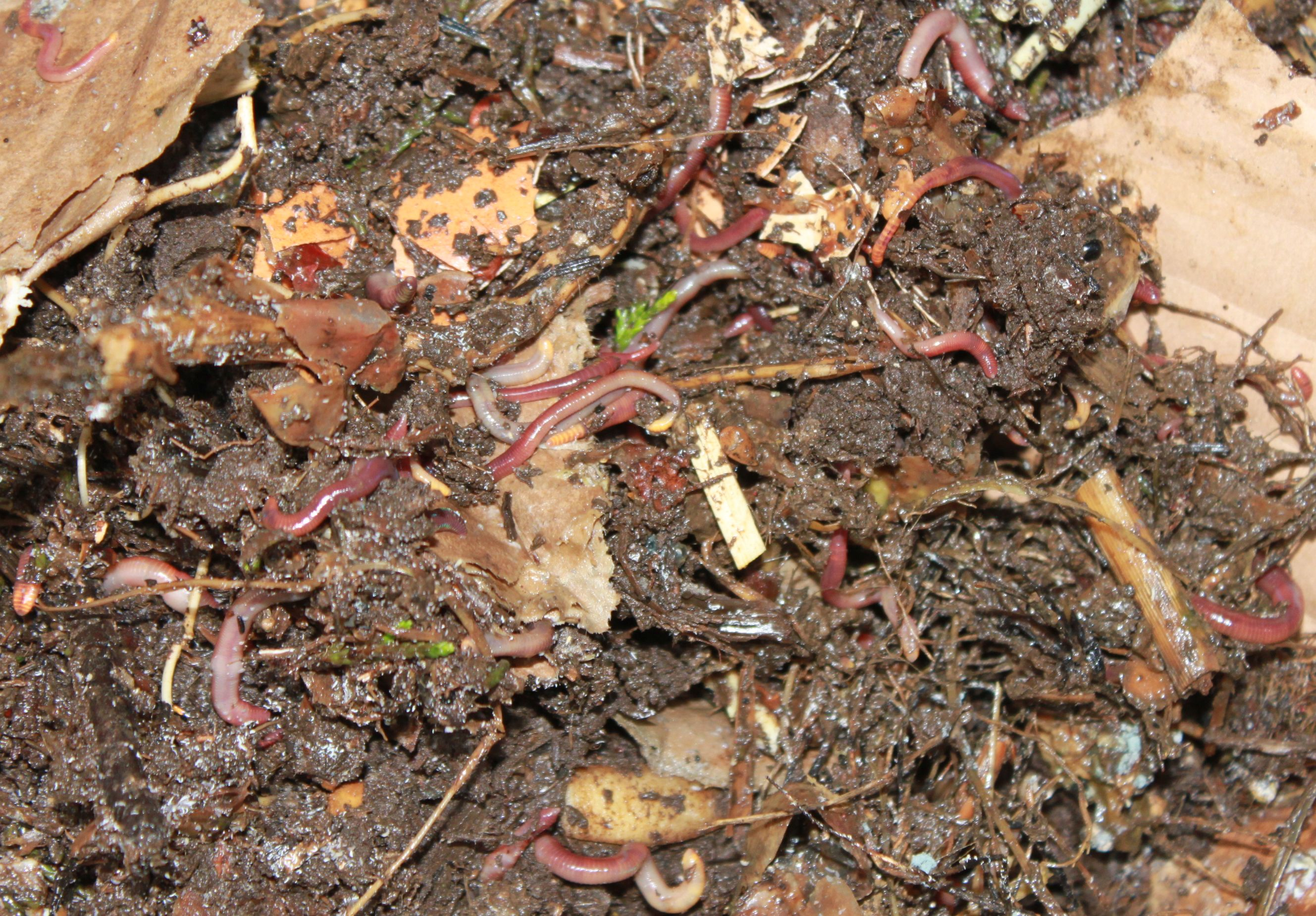 Lombricompostage